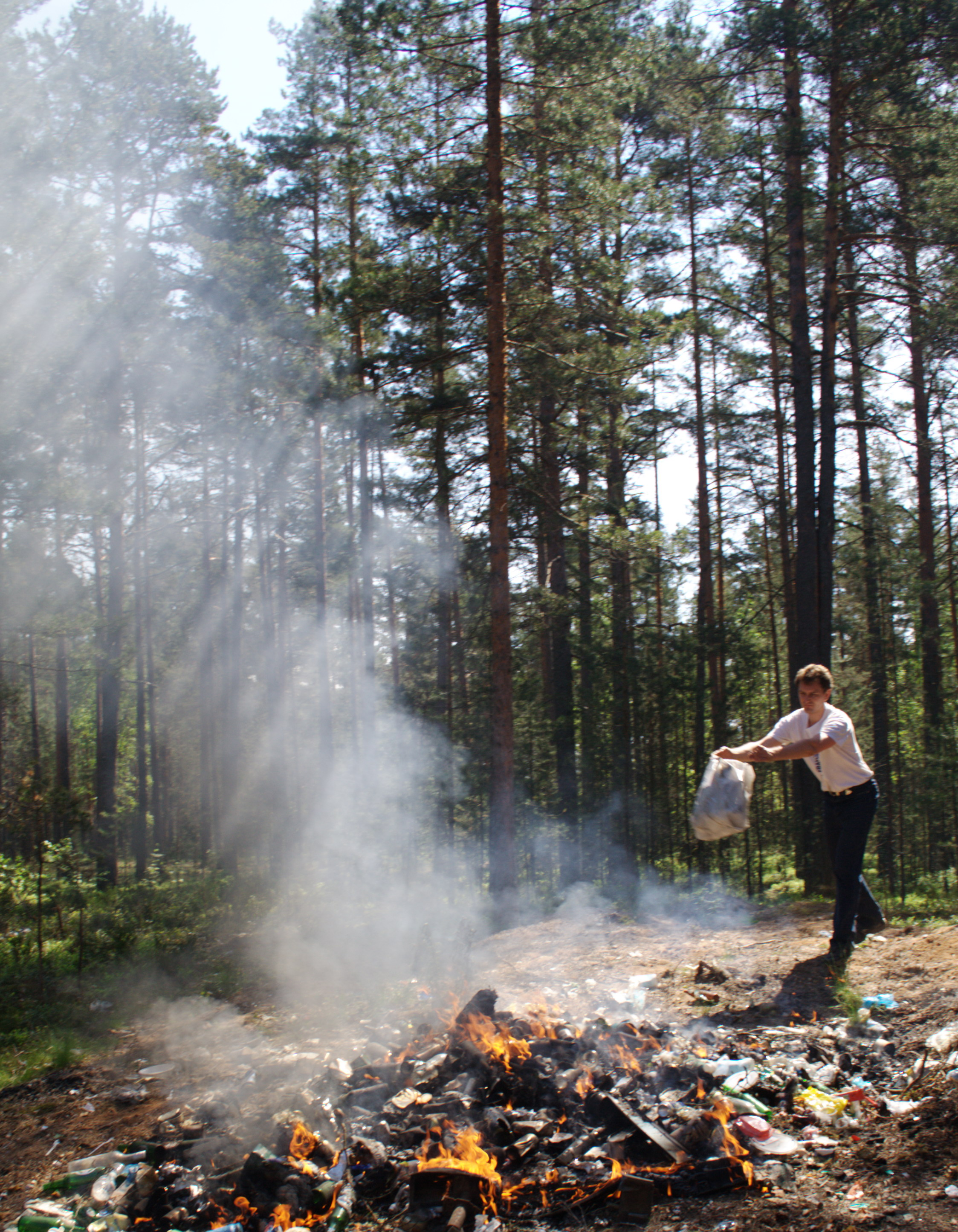 Настоящее. Уборка леса. Сжигаем мусор.